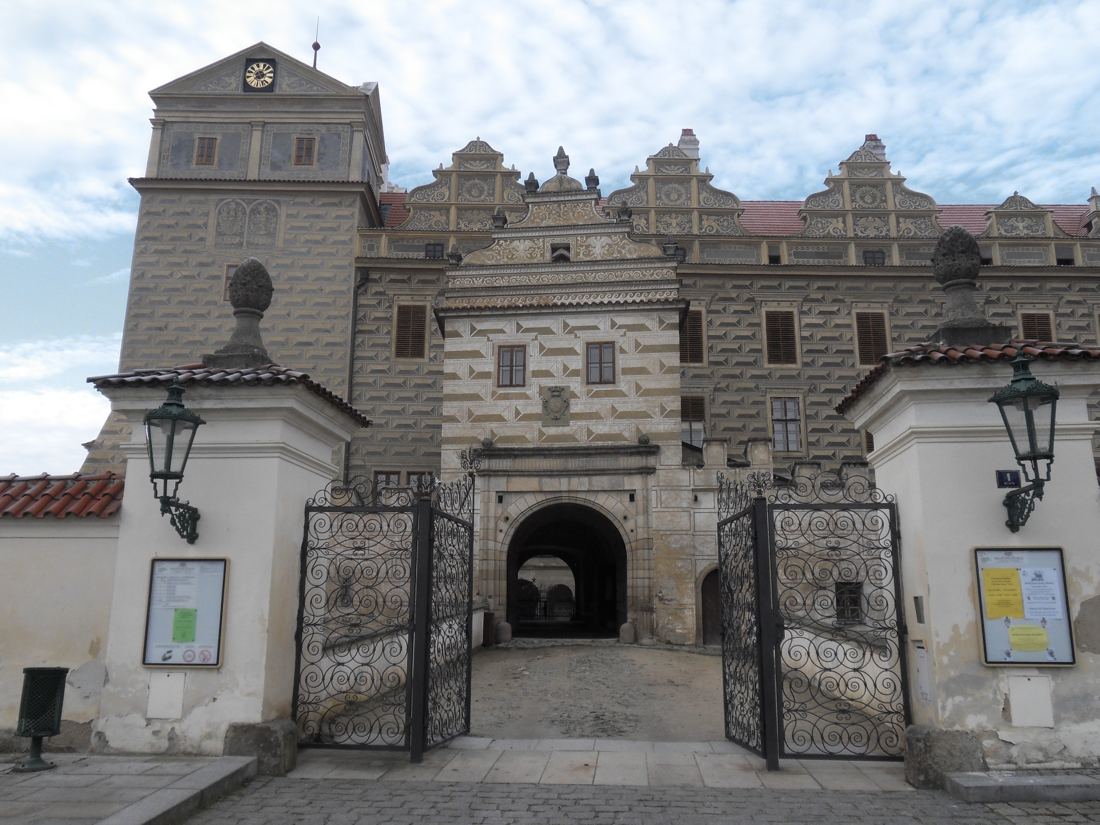 Zámek Horšovský Týn - pohled na zámek od východu